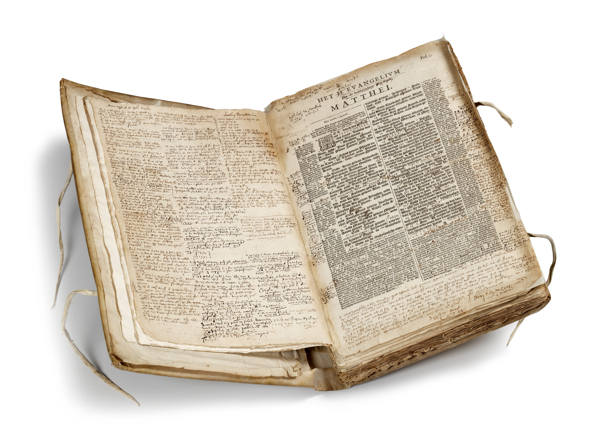 Proefdruk Evangelie van Mattheüs van de Statenvertaling 1630 - 1635 Gecommitteerde Raden van de Staten van Holland en Westfriesland, inventarisnummer 4414